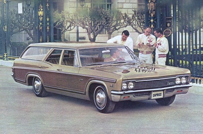 1966 Chevrolet Caprice Estate